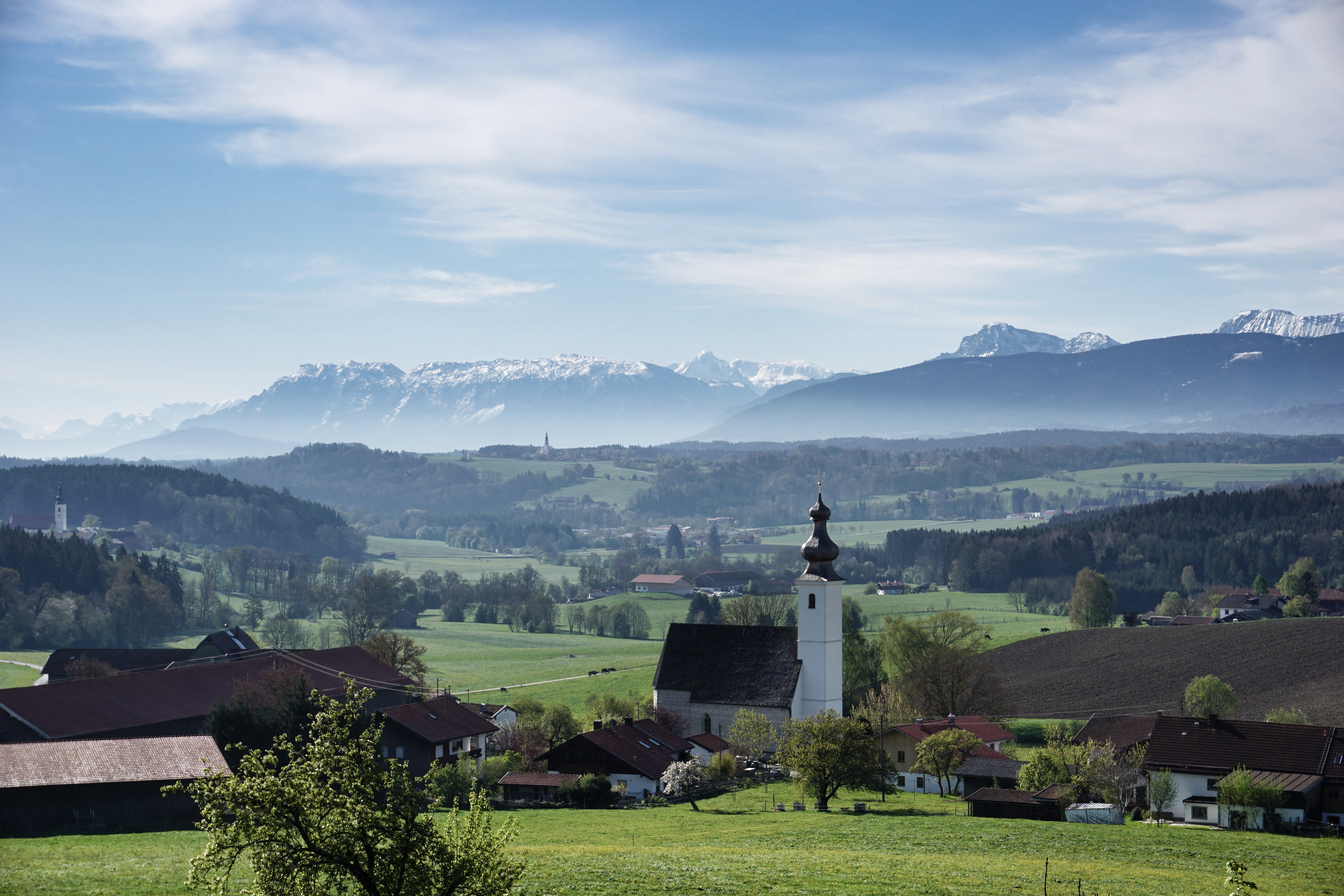 Blick von Tettelham